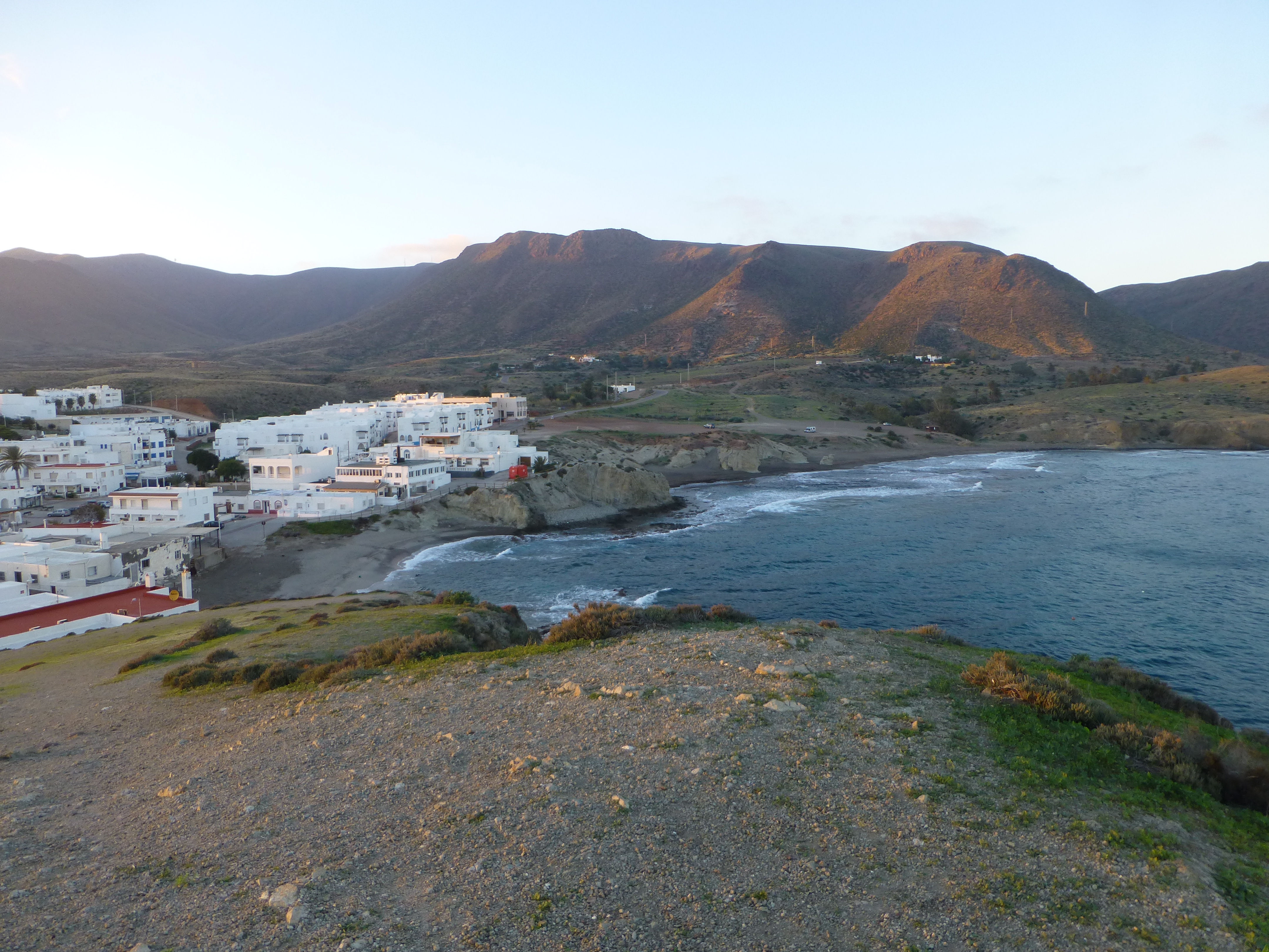 La playa del Peñón Blanco vista desde la Isleta del Moro. Parque natural Cabo de Gata-Níjar, Níjar, Almería, Andalucía, España.